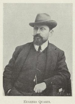 Categoria:Ebanisti italiani